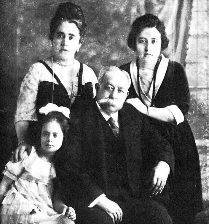 Ricardo Bentín, con su familia. Foto Doubreil, Archivo Courret, 1920.